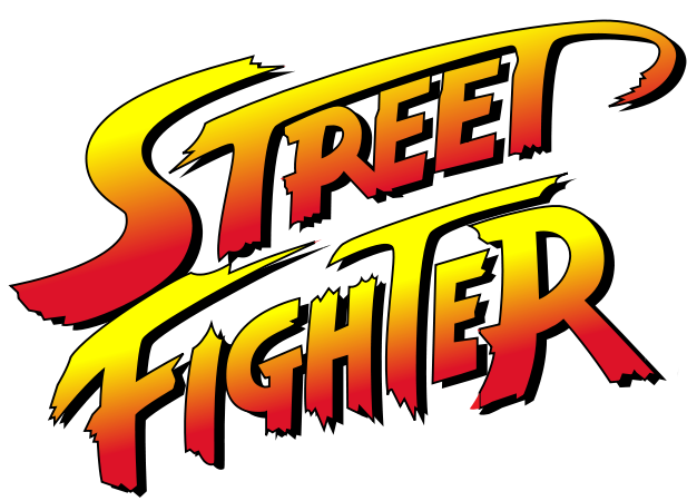 Antigo logo da série de videogame , Street Fighter